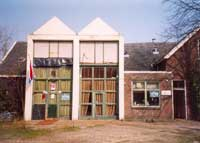 Vrijstaete.